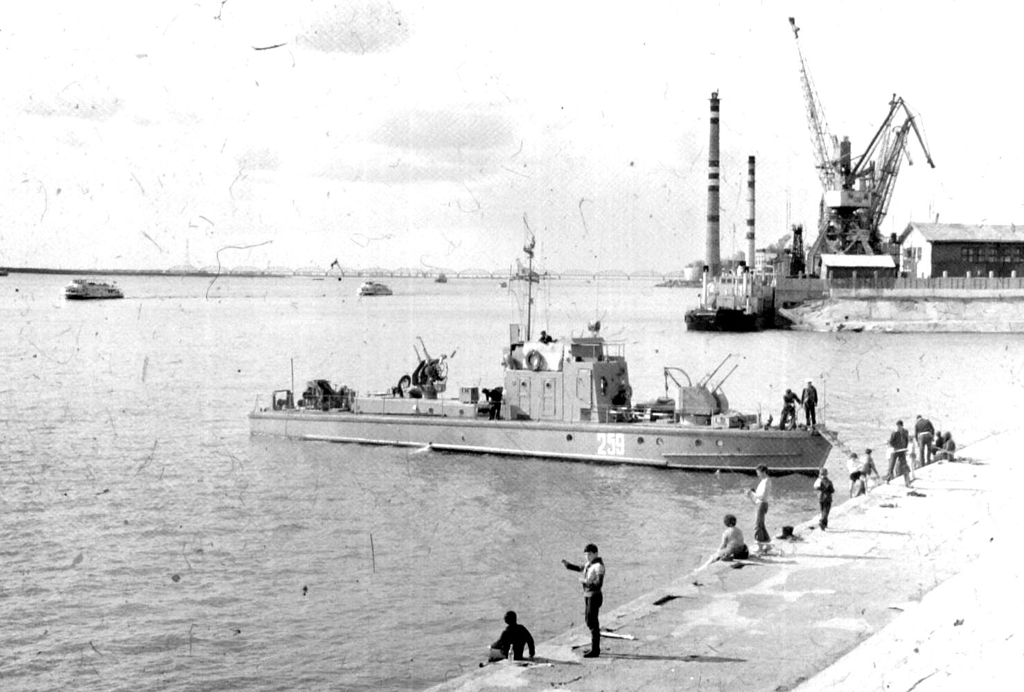 Корабль Амурской военной флотилии. Фотография сделана 9 мая 1982 года, г.Хабаровск